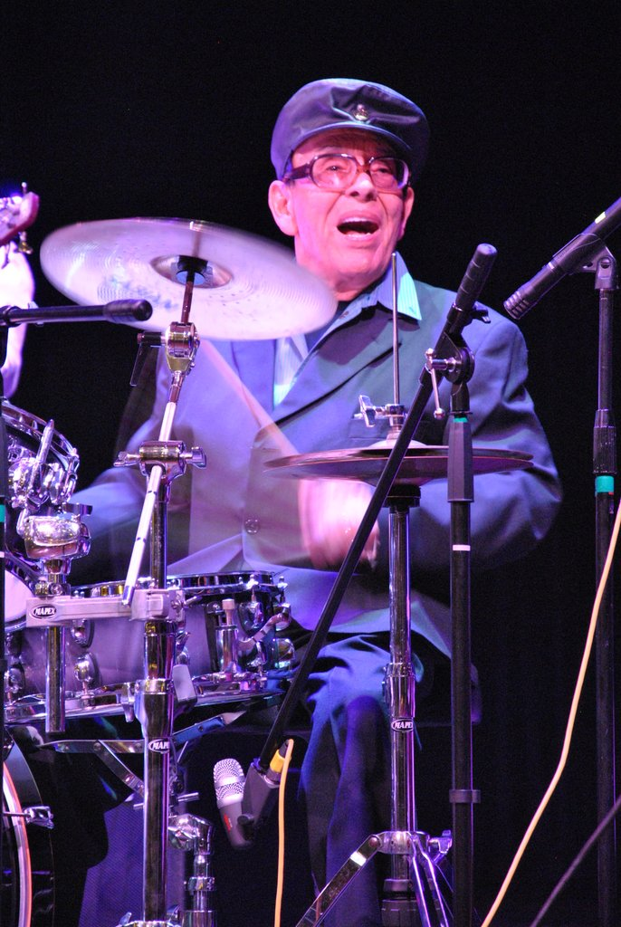 El Mtro. Tino Contreras ha representado a México en clubes y festivales de jazz en Estados Unidos, Europa y Sudamérica